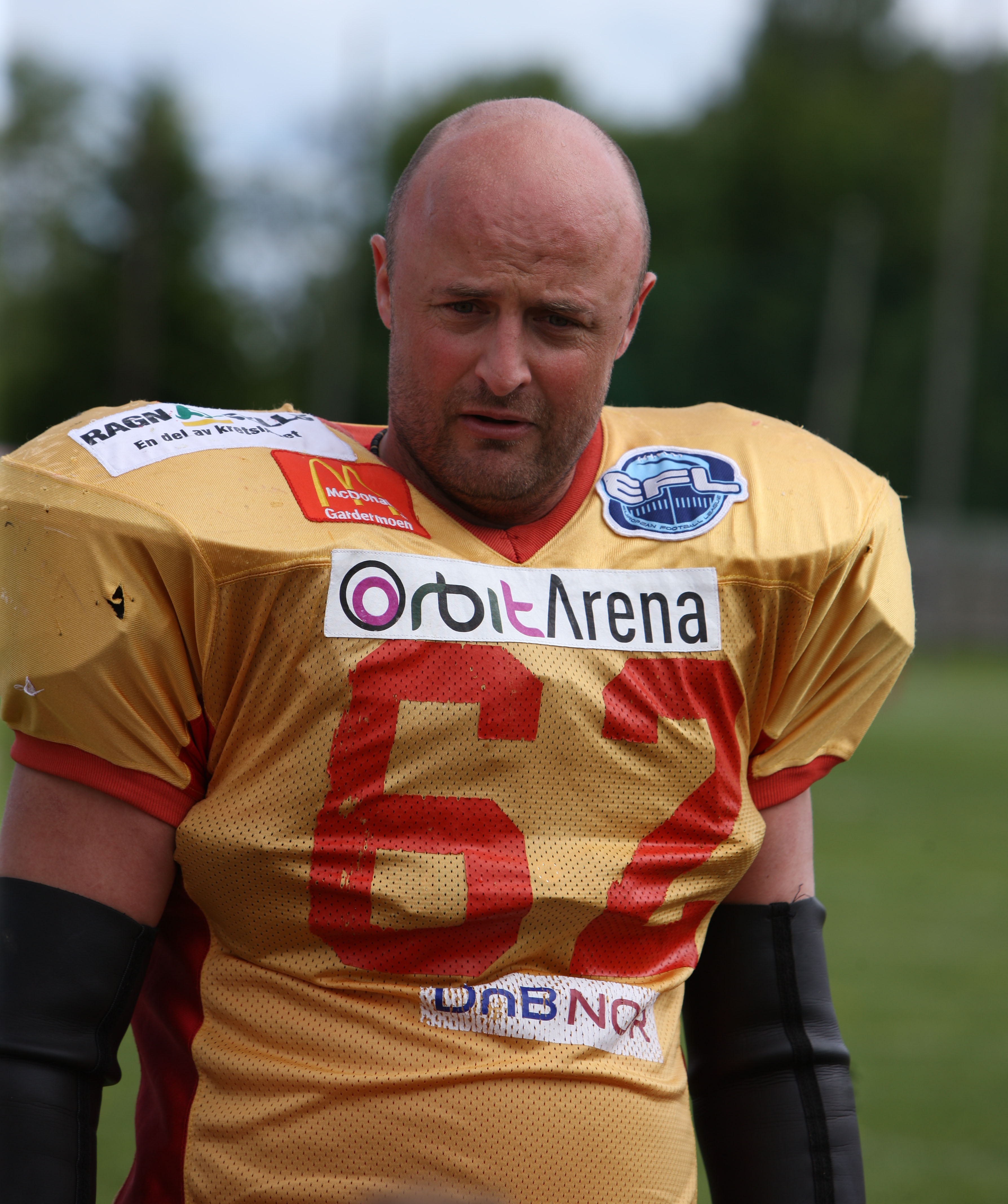 Jarle Østhagen, Eidsvoll 1814s